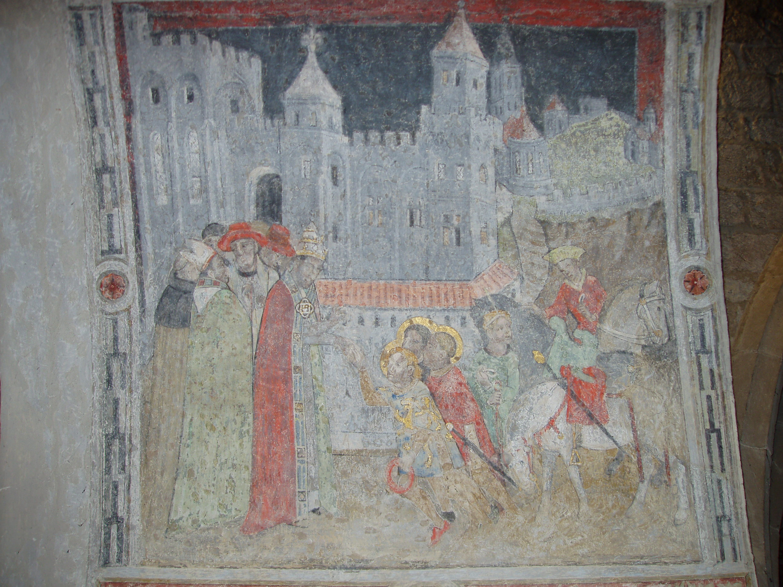 Fresque (XVe siècle) de la collégiale Saint-Barnard (Romans-sur-Isère, Drôme) : le palais des papes d'Avignon